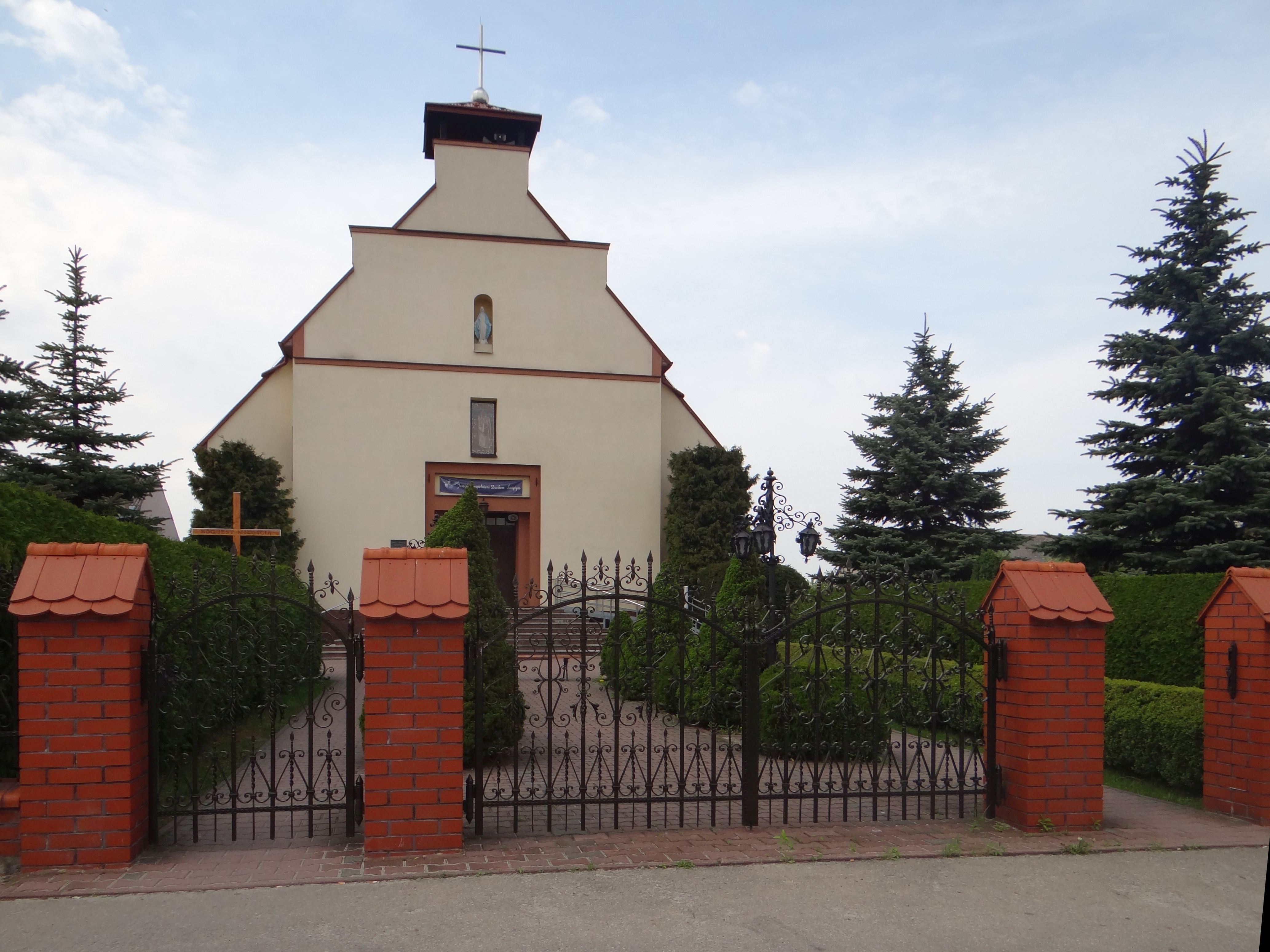 Kościół w miejscowości Bębło